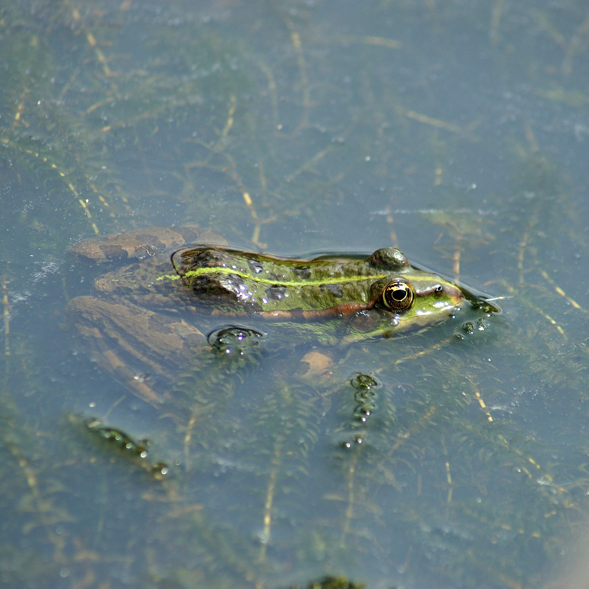 Der Seefrosch (Rana ridibunda; Syn.: Pelophylax ridibundus) gehört innerhalb der Ordnung der Froschlurche zur Familie der Echten Frösche und ebenso zur Gattung der Echten Frösche.